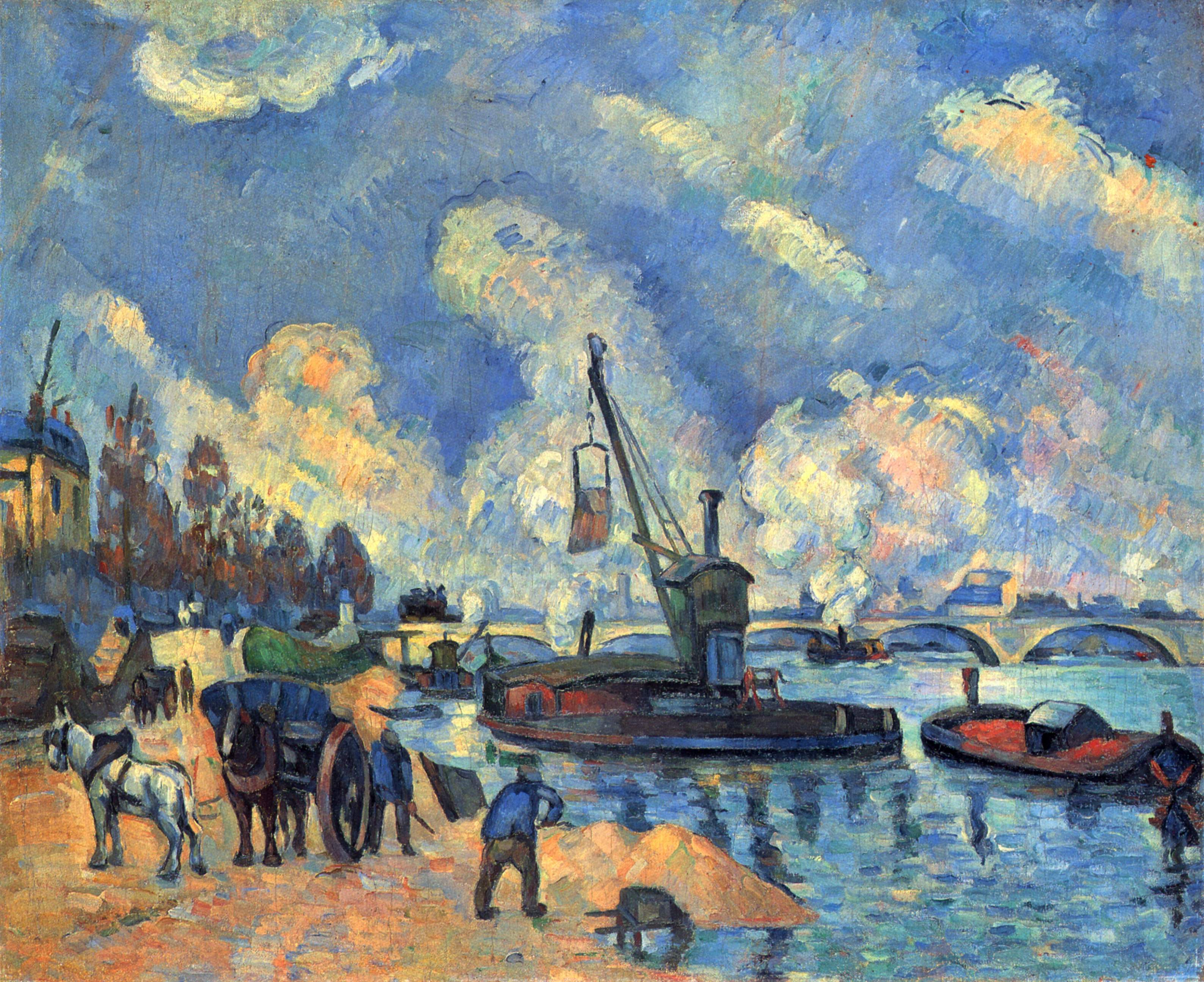 Die Seine bei Bercy, Gemälde nach Armand Guillaumin